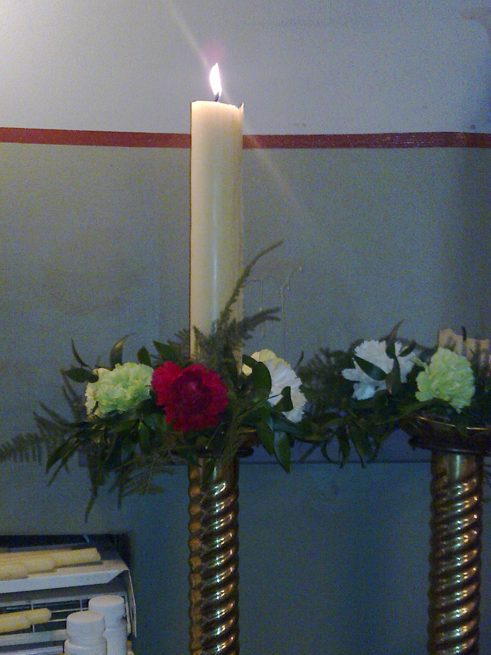 pääsiäiskoristeinen diakoninkynttilä odottamassa käyttöä